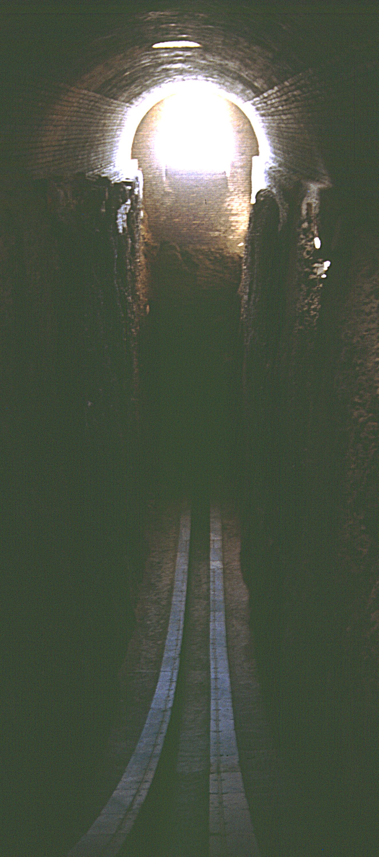 Observatorium des Ulug Beg: unterirdischer Sextant